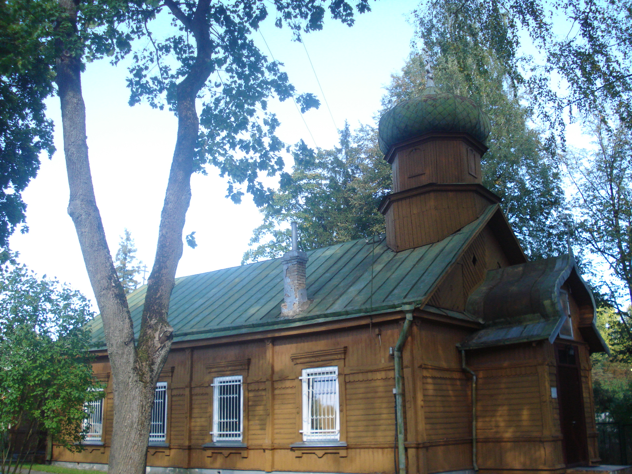 Russian Orthodox Church of St. Peter and St. Paul in Naujoji Vilnia (A. Kojelavičiaus g. 148)